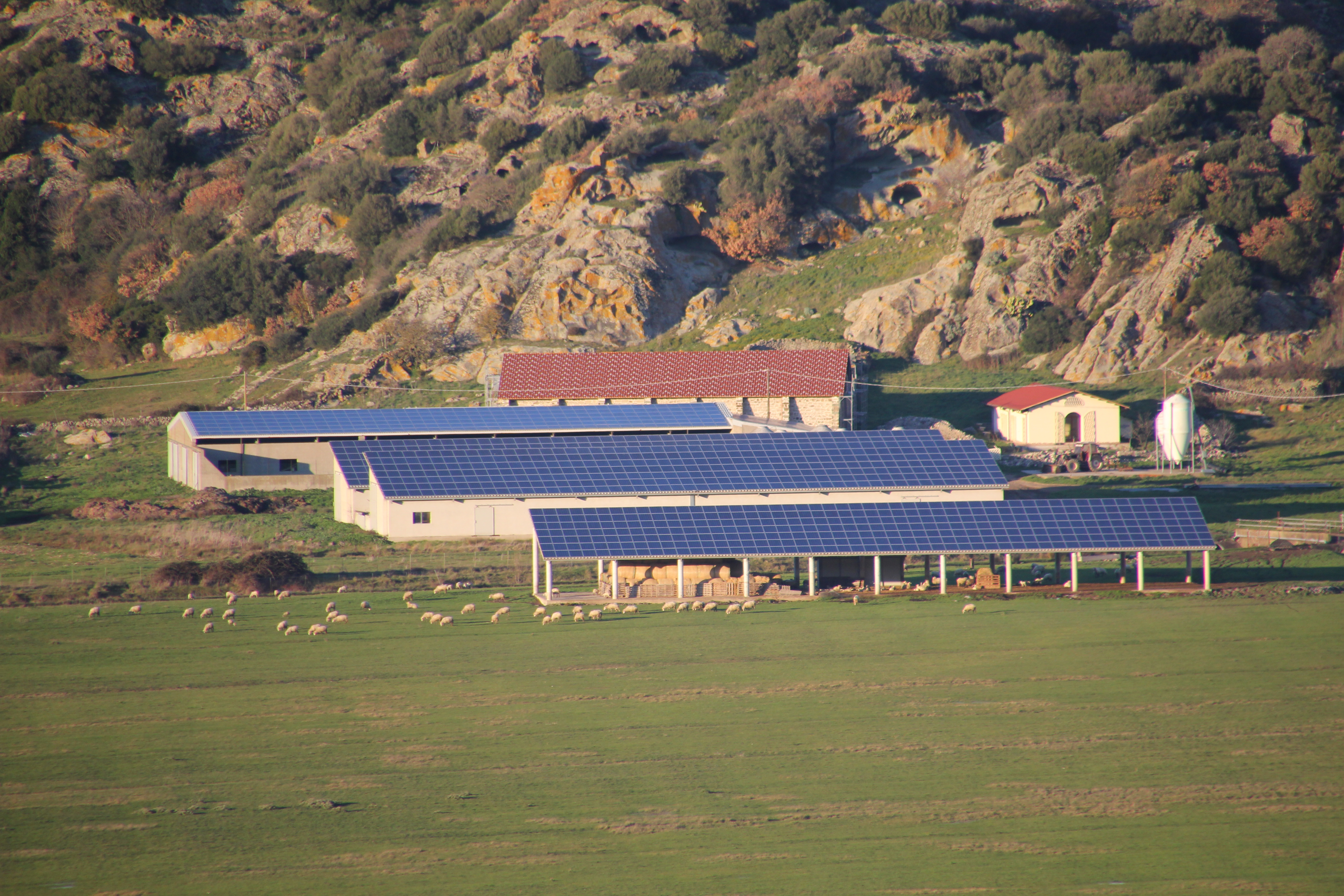 impianto fotovoltaico un agro di Bonorva